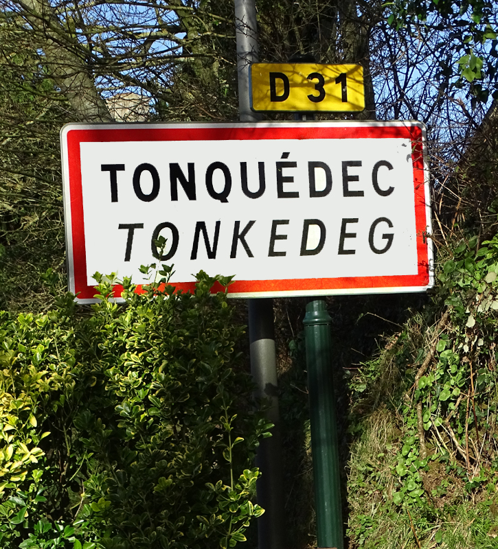 Tonkedeg. Pannell hent